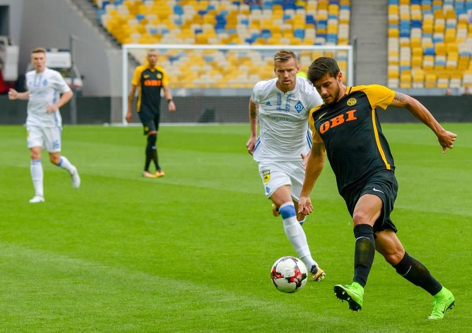 Loris Benito beim CL-Qualifikations-Hinspiel Dynamo Kiew gegen BSC Young Boys